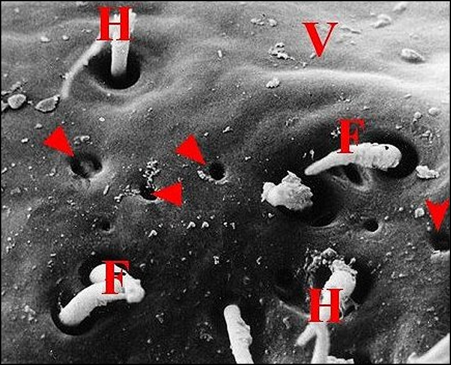 Pores des glandes tégumentaires épigastriques de Meta bourneti au microscope électronique à balayage.